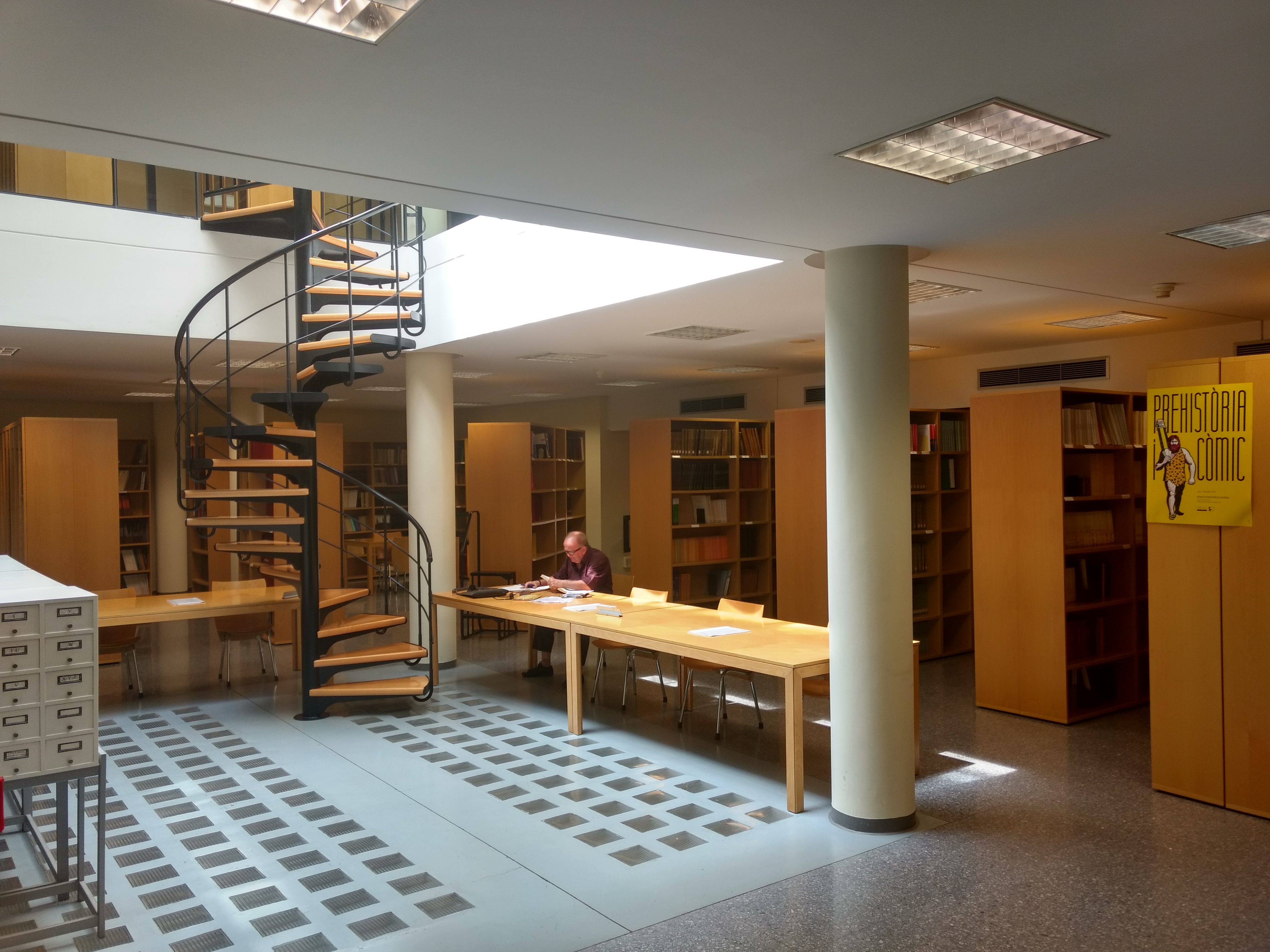 Biblioteca del Museu de Prehistòria de València.